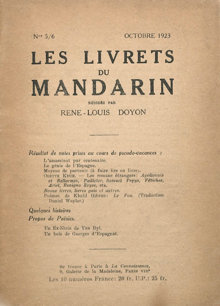 René-Louis Doyons, "Les Livrets du Mandarin", n° 5-6, octobre 1923. Source : Gallica.